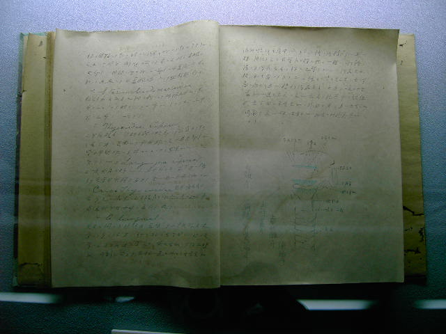 自己拍的